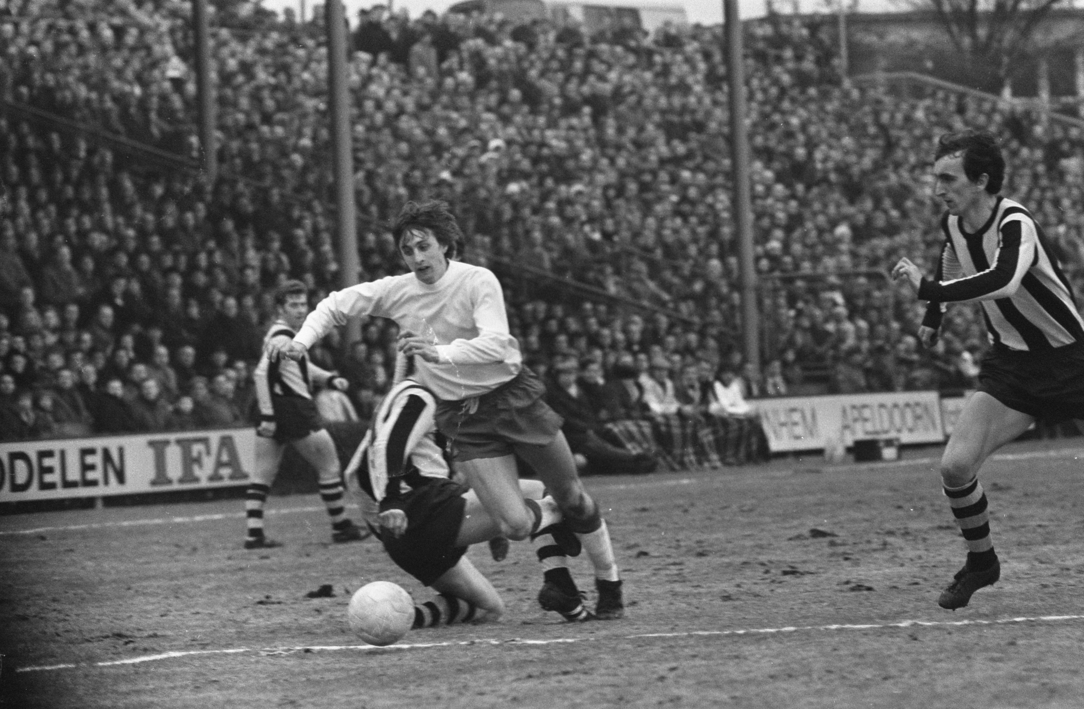 Collectie / Archief : Fotocollectie Anefo Reportage / Serie : [ onbekend ] Beschrijving : Vitesse tegen Ajax 1-3 in KNVB-beker. Johan Cruijff in aktie Annotatie : Rechts Ben Bosma Datum : 1 maart 1970 Locatie : Arnhem Trefwoorden : sport, voetbal Persoonsnaam : Cruijff, Johan Instellingsnaam : Vitesse Fotograaf : Koch, Eric / Anefo Auteursrechthebbende : Nationaal Archief Materiaalsoort : Negatief (zwart/wit) Nummer archiefinventaris : bekijk toegang 2.24.01.05 Bestanddeelnummer : 923-3094